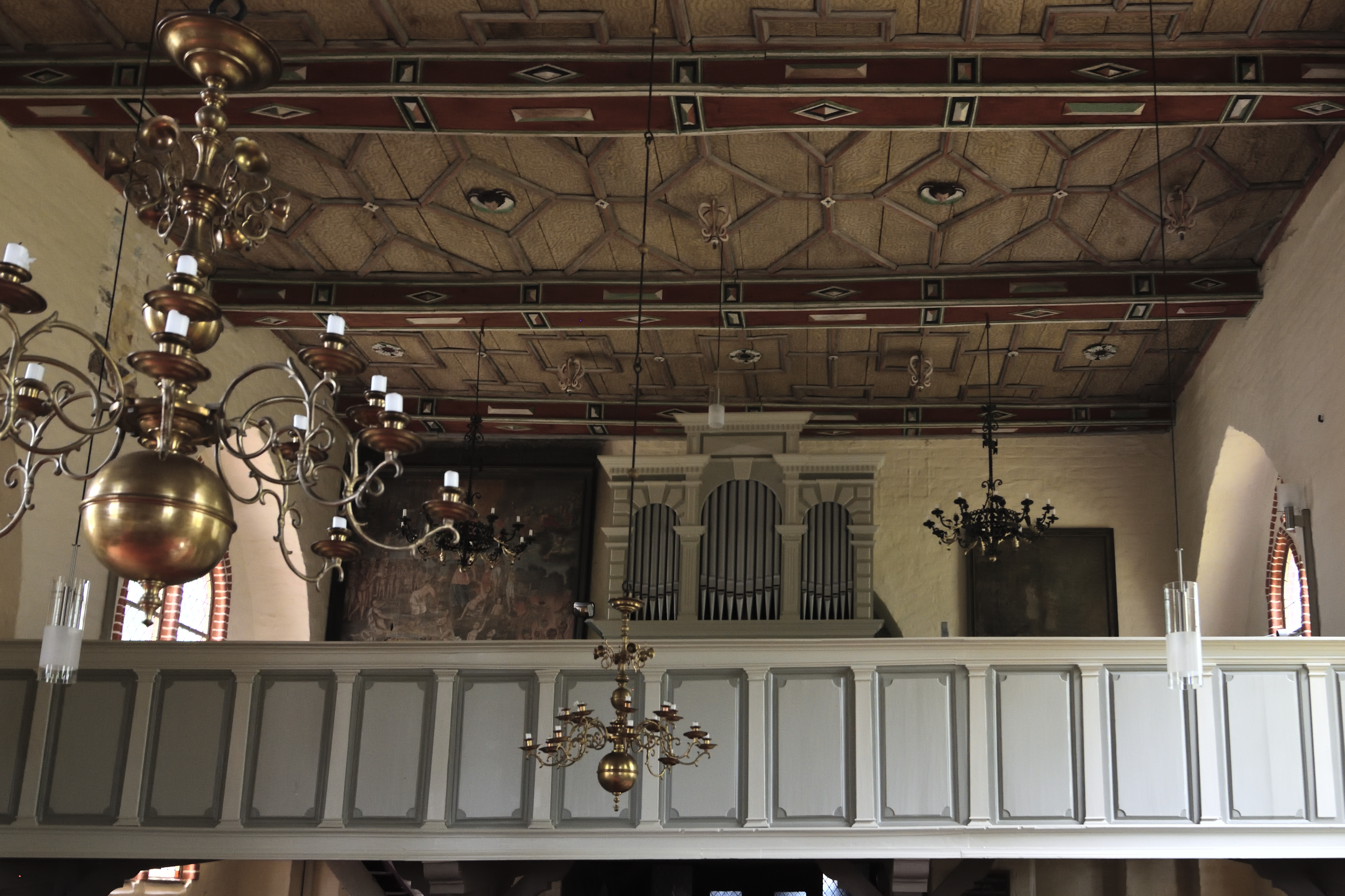 Dorfkirche in Dorf Mecklenburg, Empore